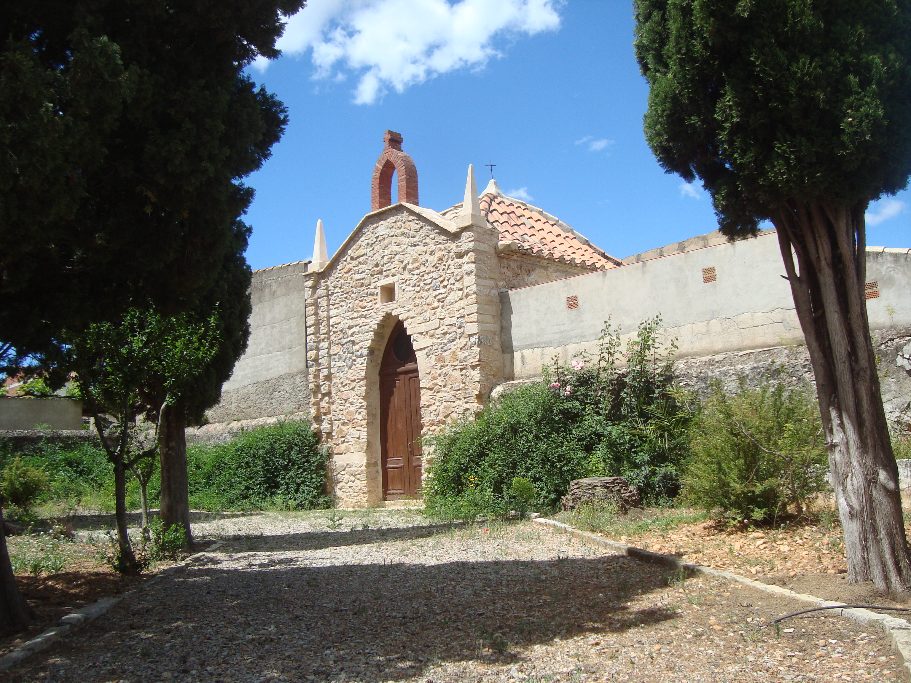 Ermita del Calvari (Atzeneta del Maestrat) 04.001-007.